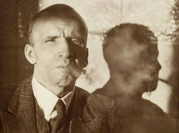 Hugo Erfurth - Portrait des Fotografen Albert Renger-Patzsch, oil pigment print, 6.54 in. (16.60 cm.) (height) by 8.74 in. (22.20 cm.) (width)